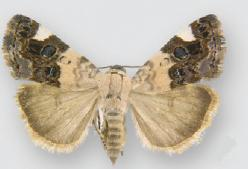 Acontia areli female